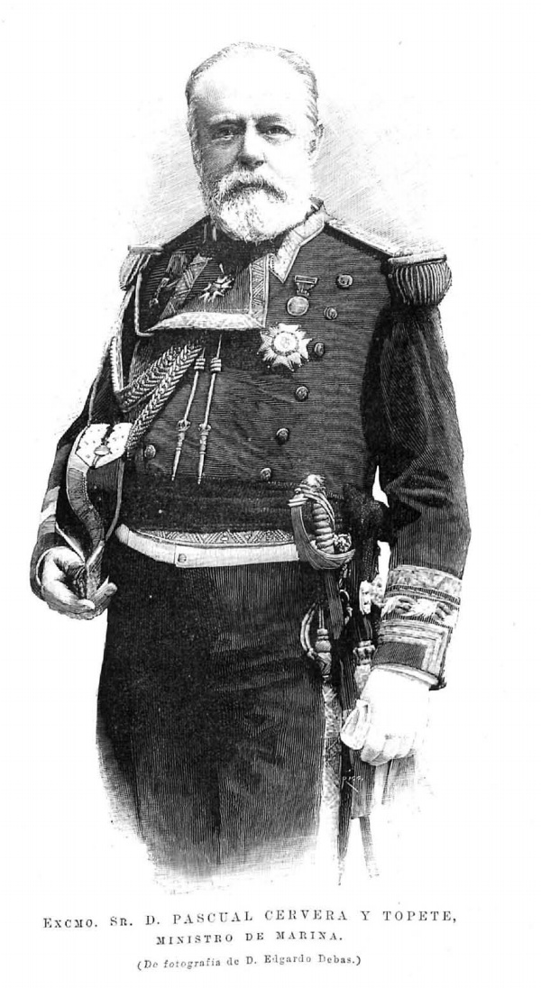 Grabado de Pascual Cervera y Topete, de fotografía de Edgardo Debás